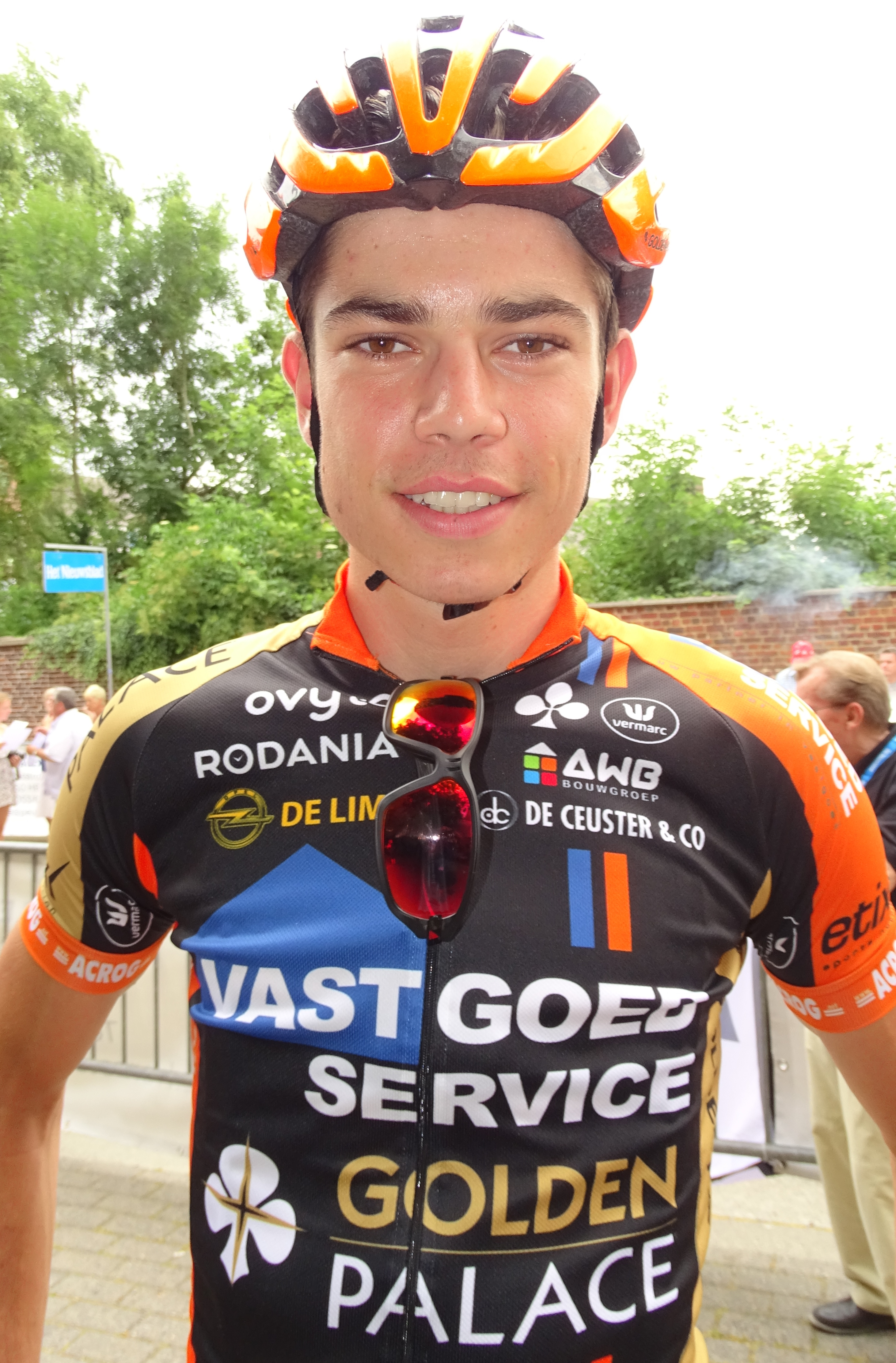 Reportage réalisé le samedi 4 juillet à l'occasion du départ et de l'arrivée du Circuit Het Nieuwsblad espoirs 2015 à Grotenberge (Zottegem), Belgique.